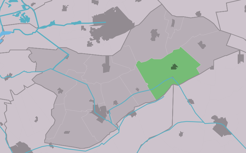 Kaartsje fan himrik fan Wynjewâld